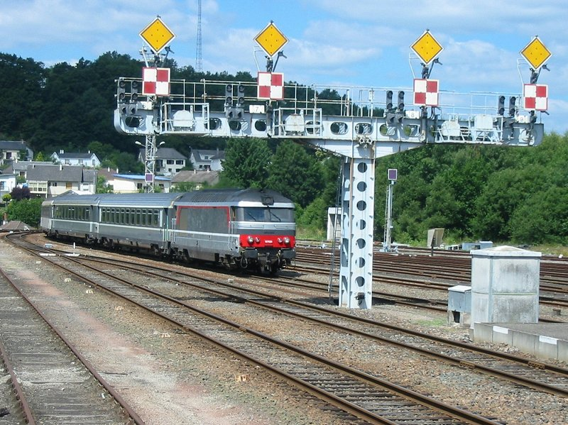 Train Corail "Le Ventadour" entre en gare d'Ussel - Il effectuait la liaison Bordeaux Lyon via Brive et Clermont-Ferrand